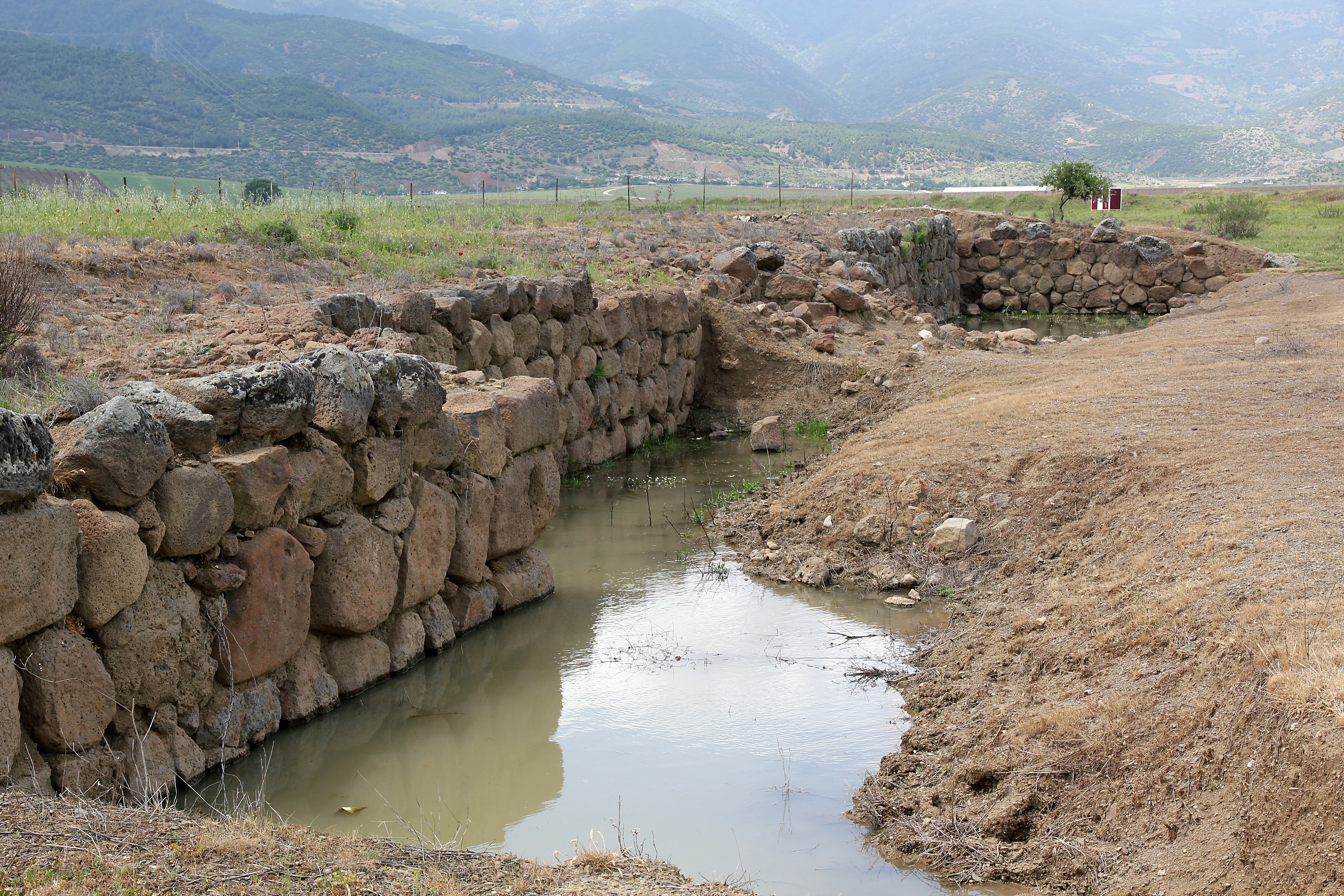 Zincirli (Sam'al), Archäologische Grabungsstelle bei Islahiye, Südtürkei, Äußere Stadtmauer